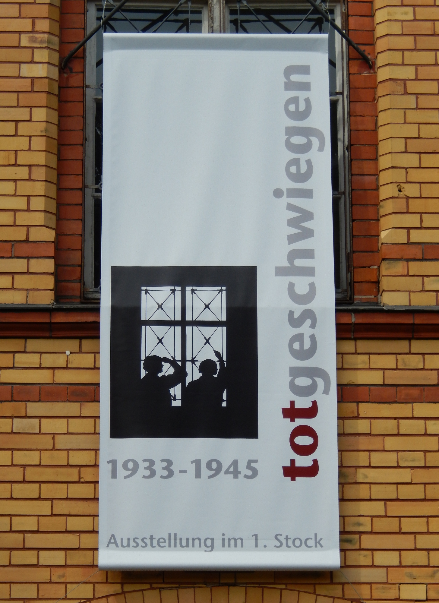 Plakat der Ausstellung "Totgeschwiegen 1933 - 1945. Zur Geschichte der Wittenauer Heilstätten. Seit 1957 Karl-Bonhoeffer-Nervenklinik."